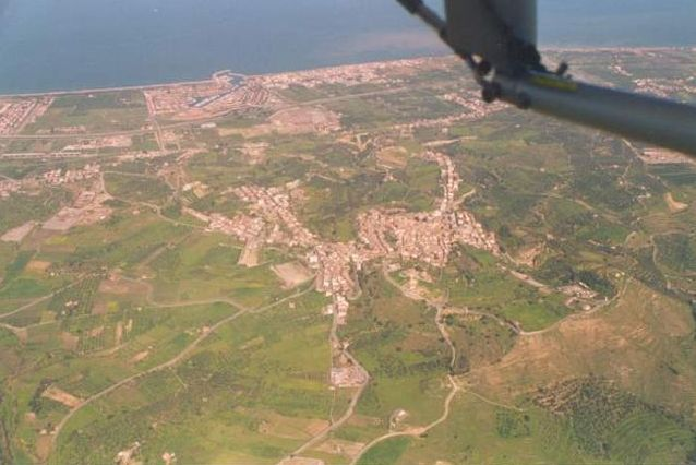 Veduta dall'alto di tutto il territorio di Furnari.